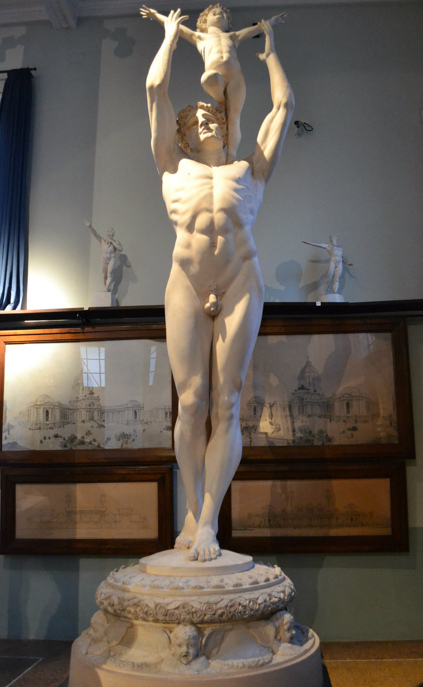 Museo Hendrik C. Andersen - MIBAC This is a photo of a monument which is part of cultural heritage of Italy.